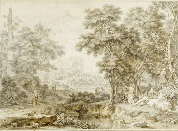 Arcadisch landschap met ruïnes, inkt en aquarel op papier, 28 x 40 cm